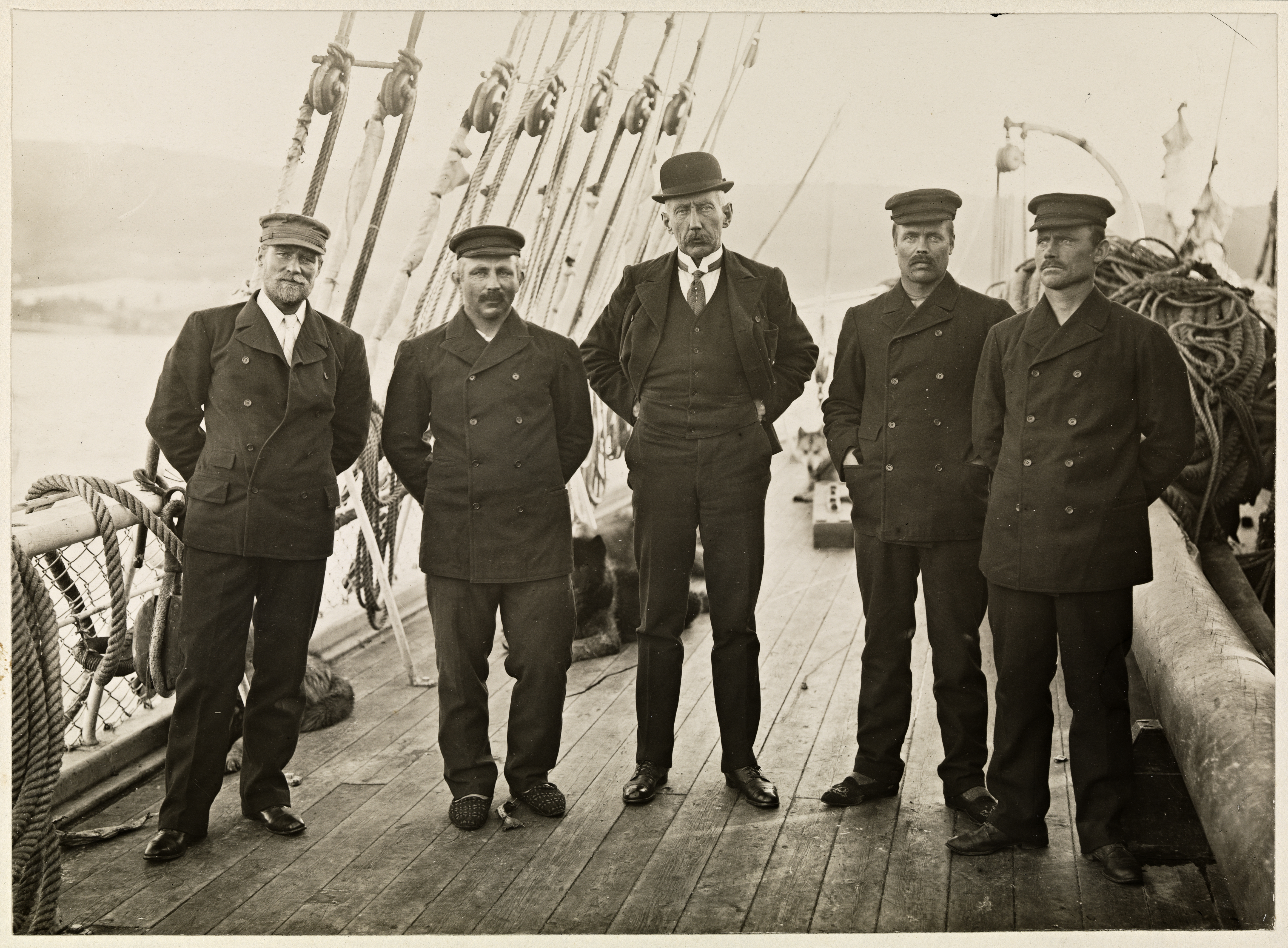 Beskrivelse / Description: Sverre Hassel, Oscar Wisting, Roald Amundsen, Olav Bjaaland og Helmer Hanssen står på "Fram"s dekk. Dato / Date: 7. mars 1912 Sted / Place: Australia, Tasmania, Hobart Fotograf / Photographer: ukjent / unknown Digital kopi av original / Digital copy of original: s/h papirpositiv Eier / Owner Institution: Nasjonalbiblioteket / National Library of Norway Lenke / Link: Bildesignatur / Image Number: bldsa_NPRA3135